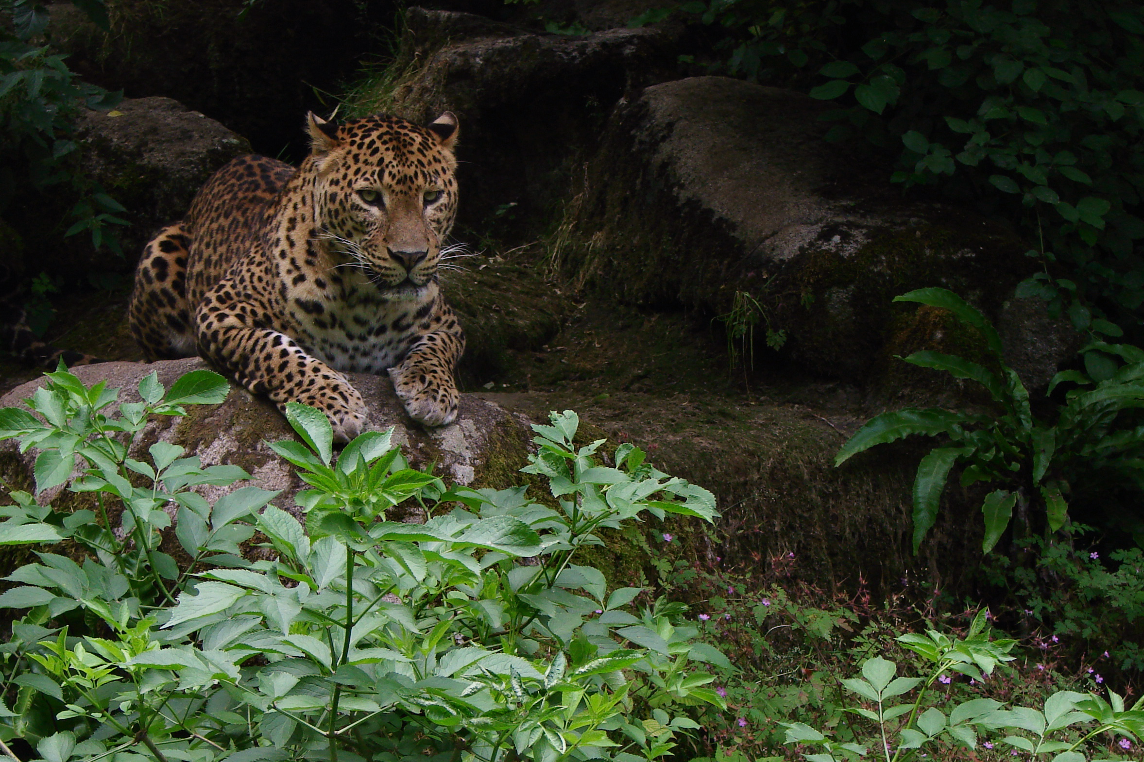 Léopard du Sri-Lanka (Panthera pardus kotiya) au zoo de Doué-la-Fontaine.